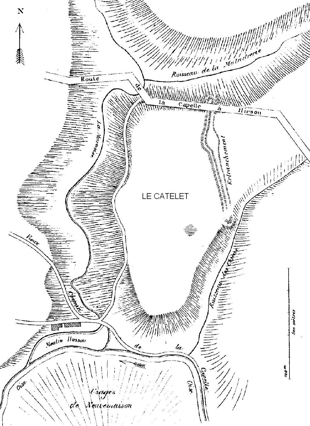 Camp romain de Câtelet de Mondrepuis (Thiérache)